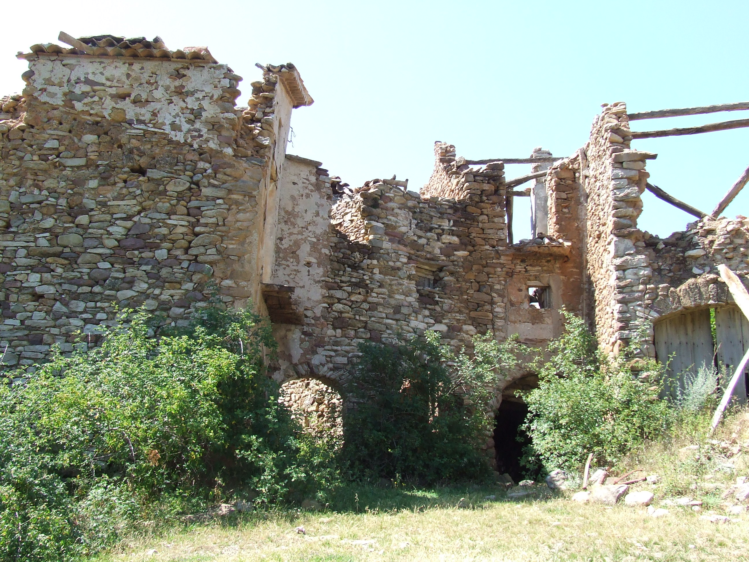 L'antiga plaça de la Bastida de Bellera (Sarroca de Bellera, Pallars Jussà)